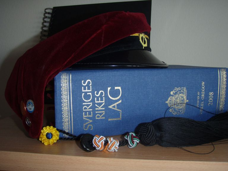 Teknologmössa från LTU, kampus Luleå